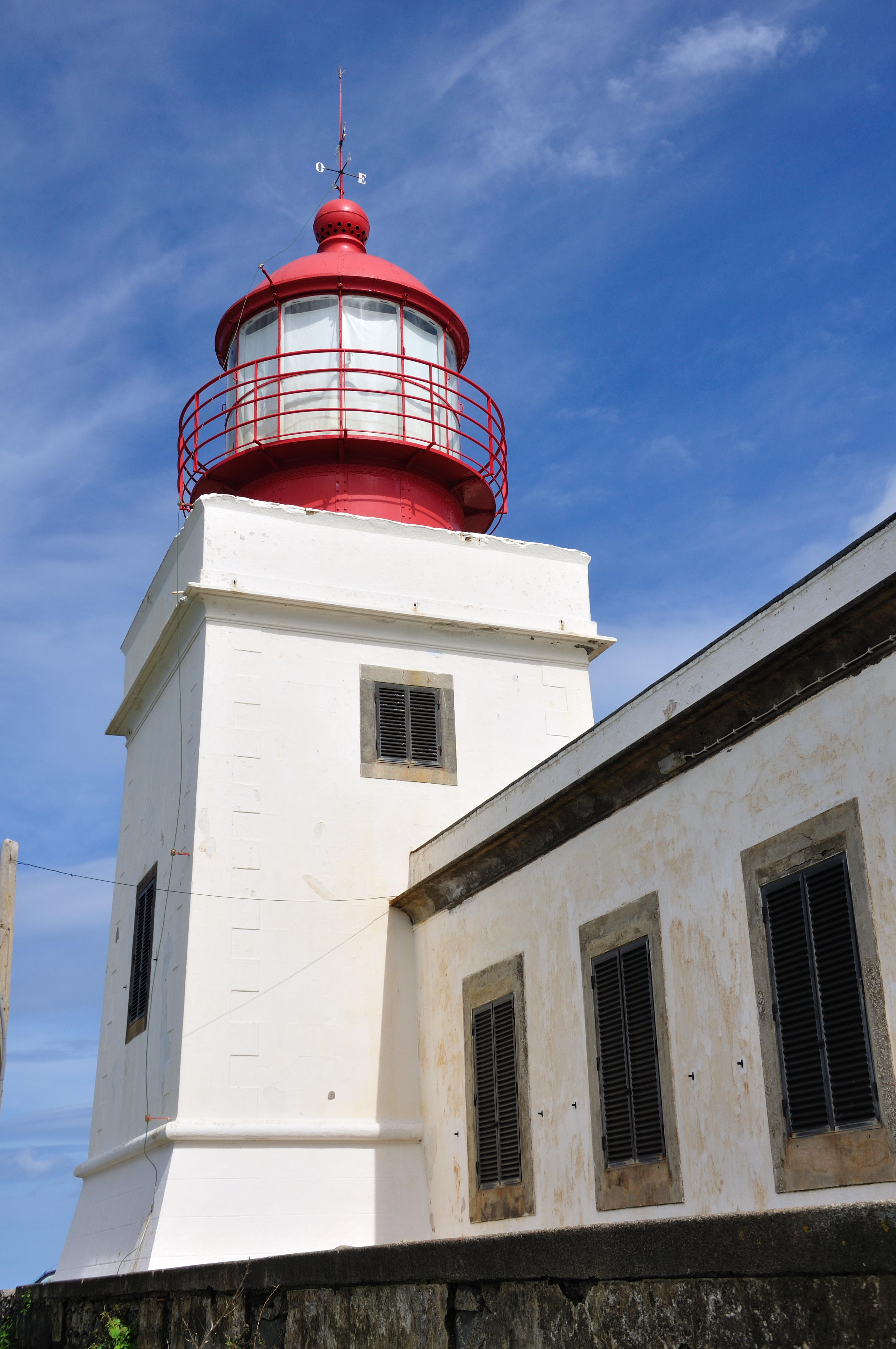 Portugal, Madeira, lighthouse at Ponta do Pargo